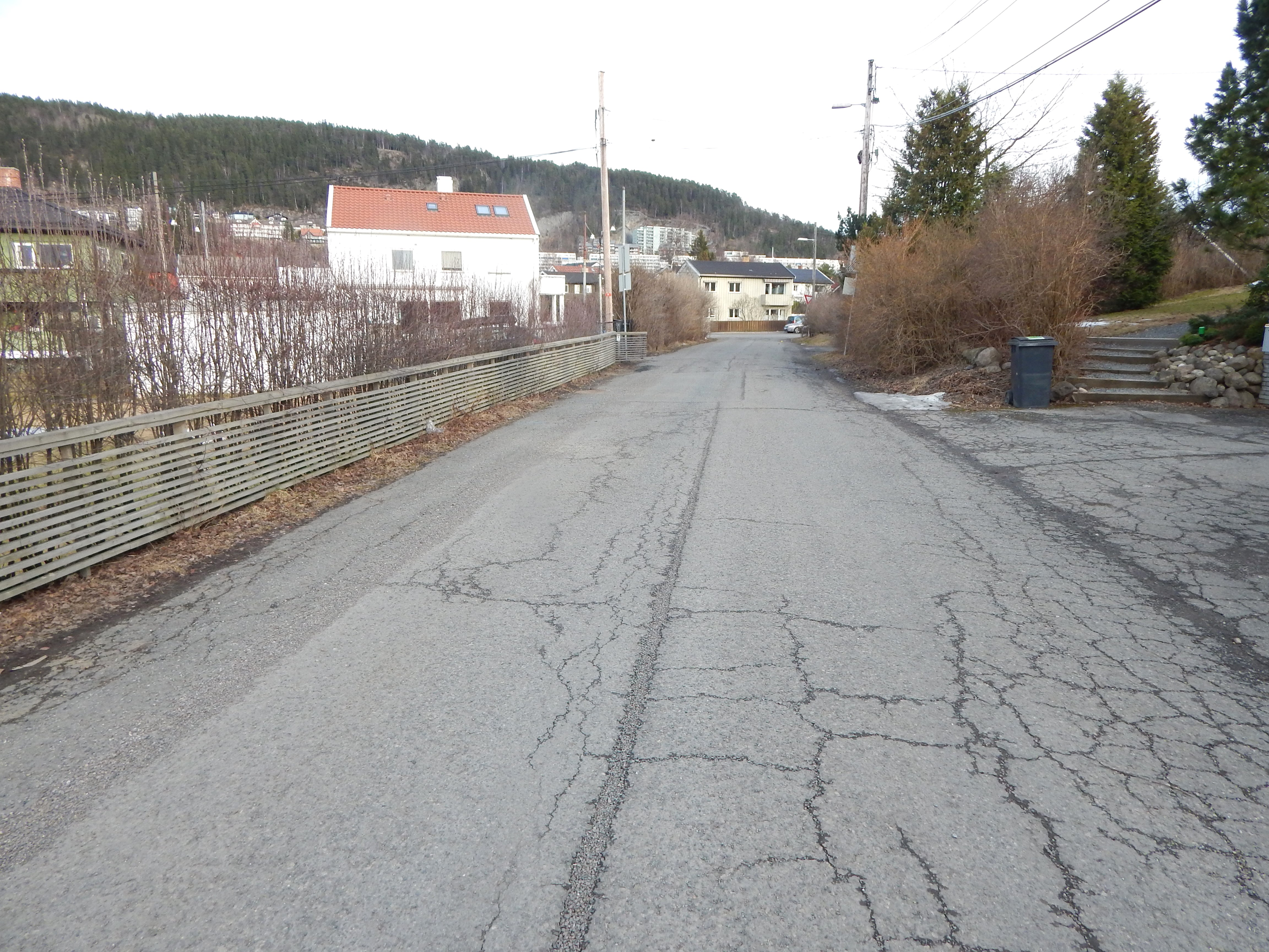 Siriusveien på Grefsenplatået